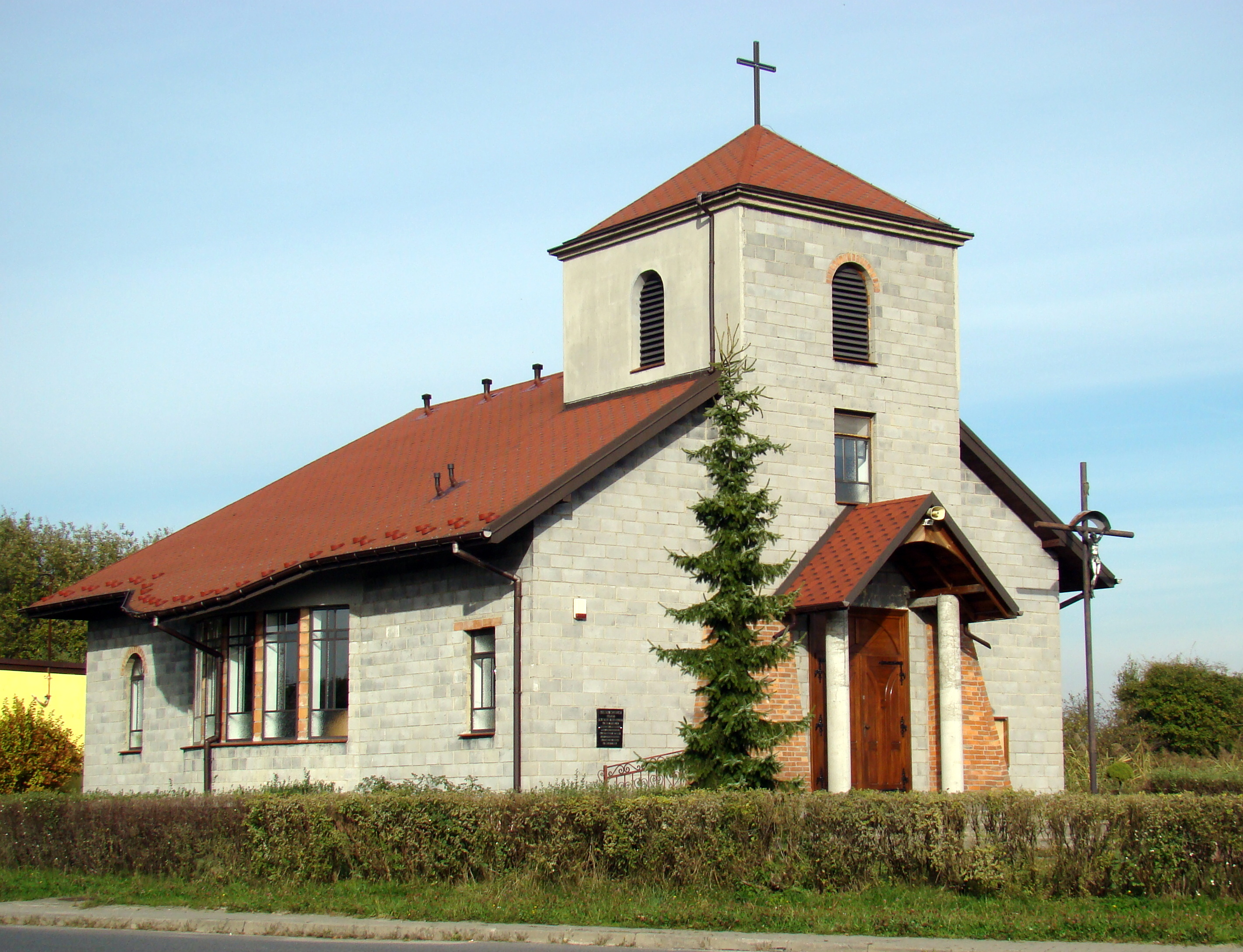 Kaplica pw. św. Marii Magdaleny w Hucie Starej A, należąca do parafii św. Jana Chrzciciela w Poczesnej. Kamień węgielny pod kaplicę położono 10 września 1998 roku.